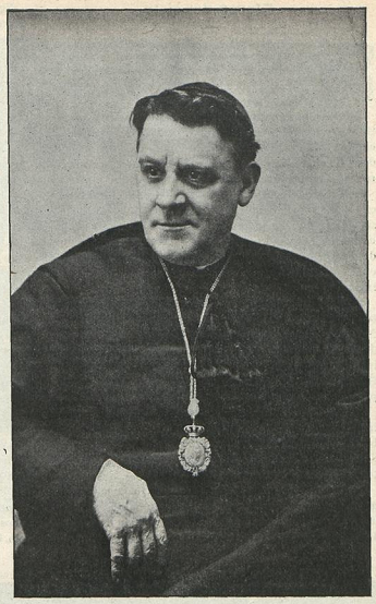 Estanislao de Labayru.